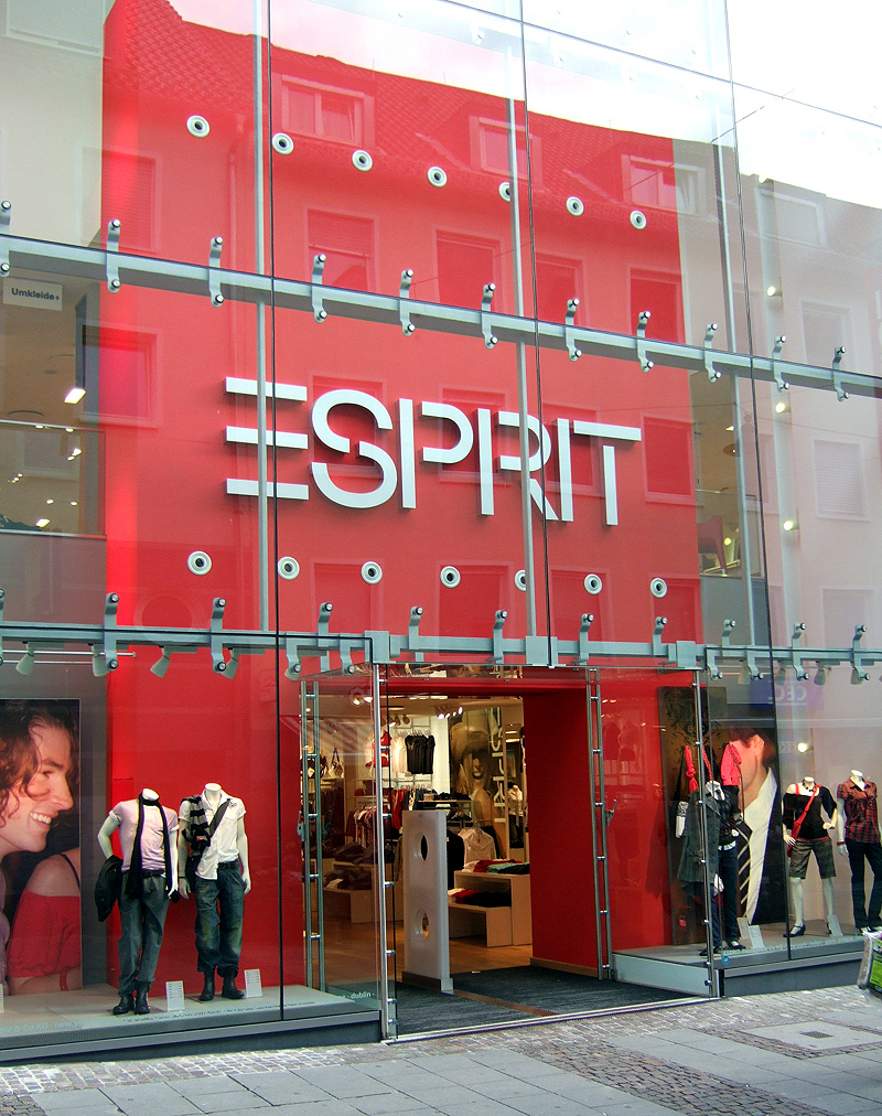 Esprit Geschäft in Darmstadt